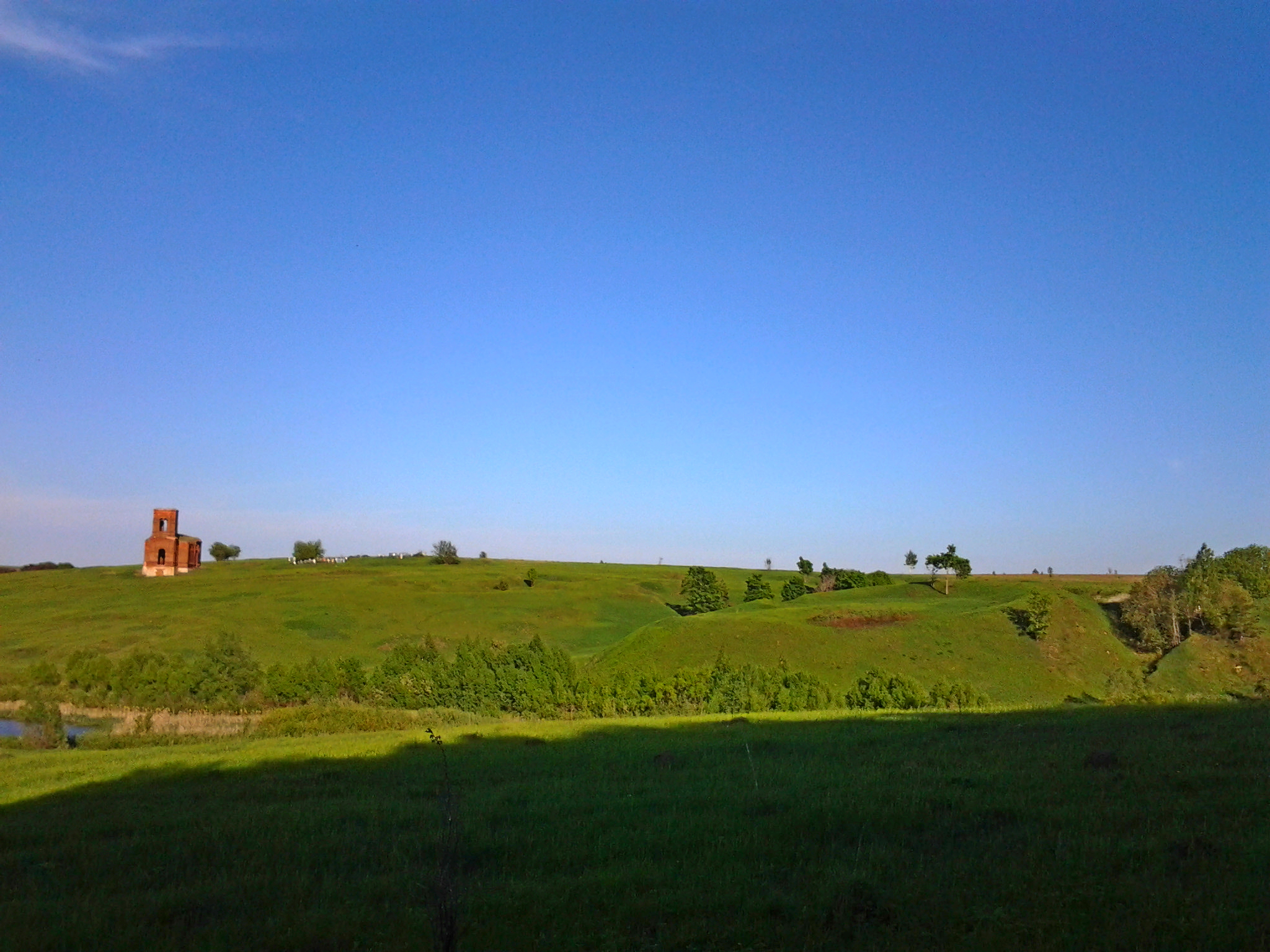 Село Долматово. Рязанская область. Старожиловский район